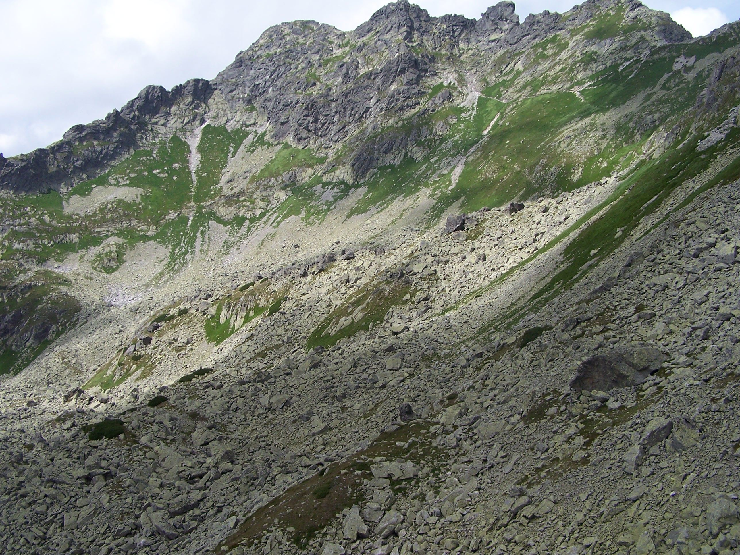 Dolinka pod Kołem (Dolina 5 Stawów Polskich)